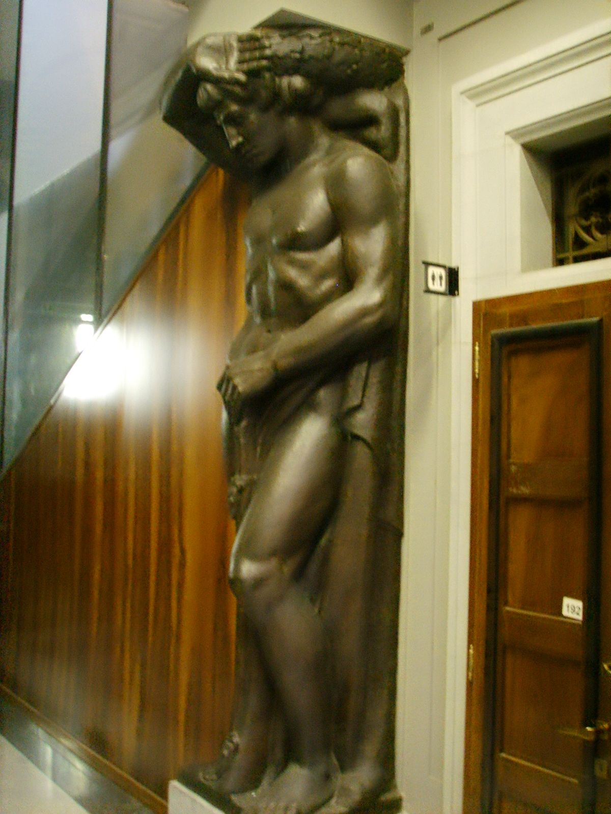 Biblioteca Nazionale Centrale di Firenze, telamone.